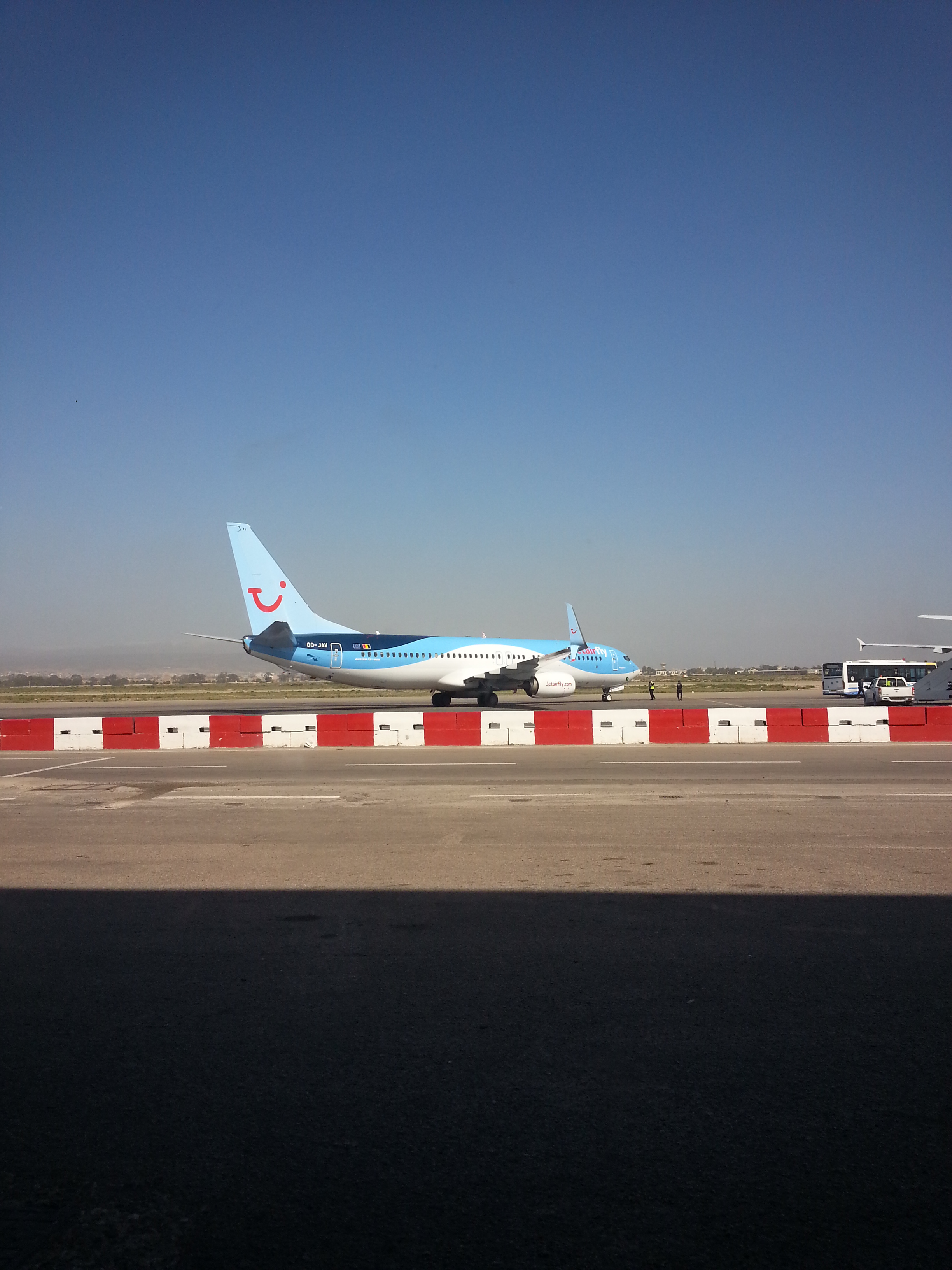 jetairfly a oran Algérie